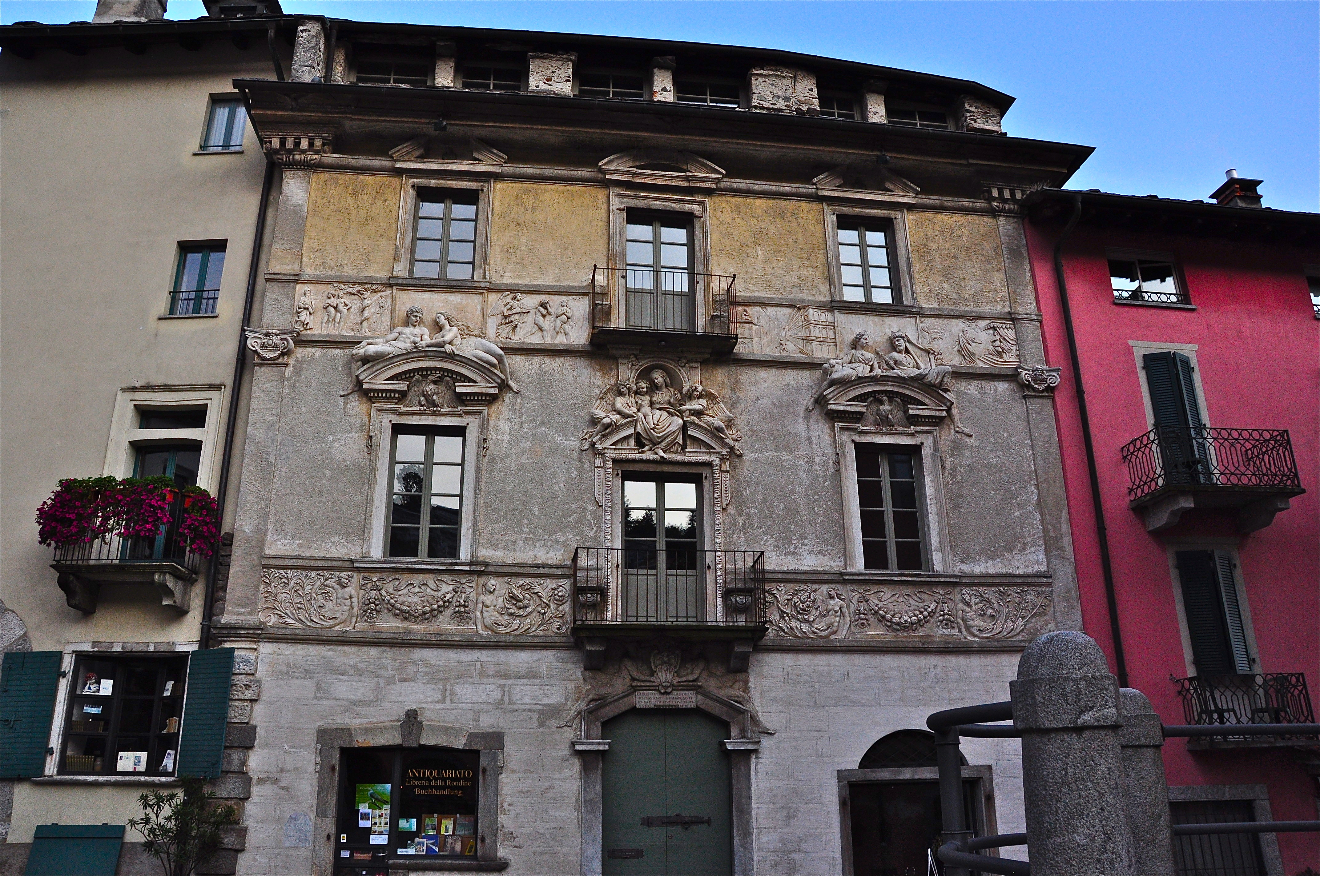 Facciata